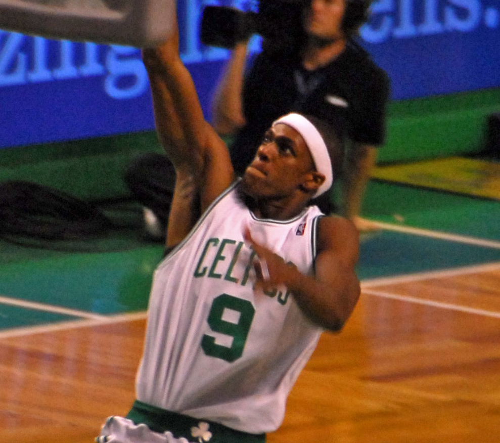 Rajon Rondo zakucava tijekom utakmice sa Hornetsima.